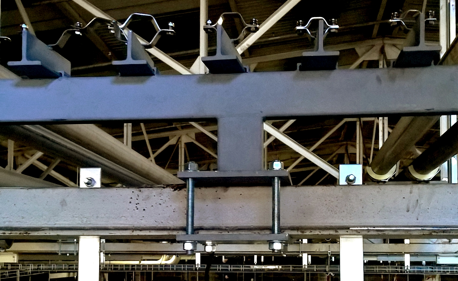 Support de tuyauteries fixé sur charpente métallique horizontale par crapautage